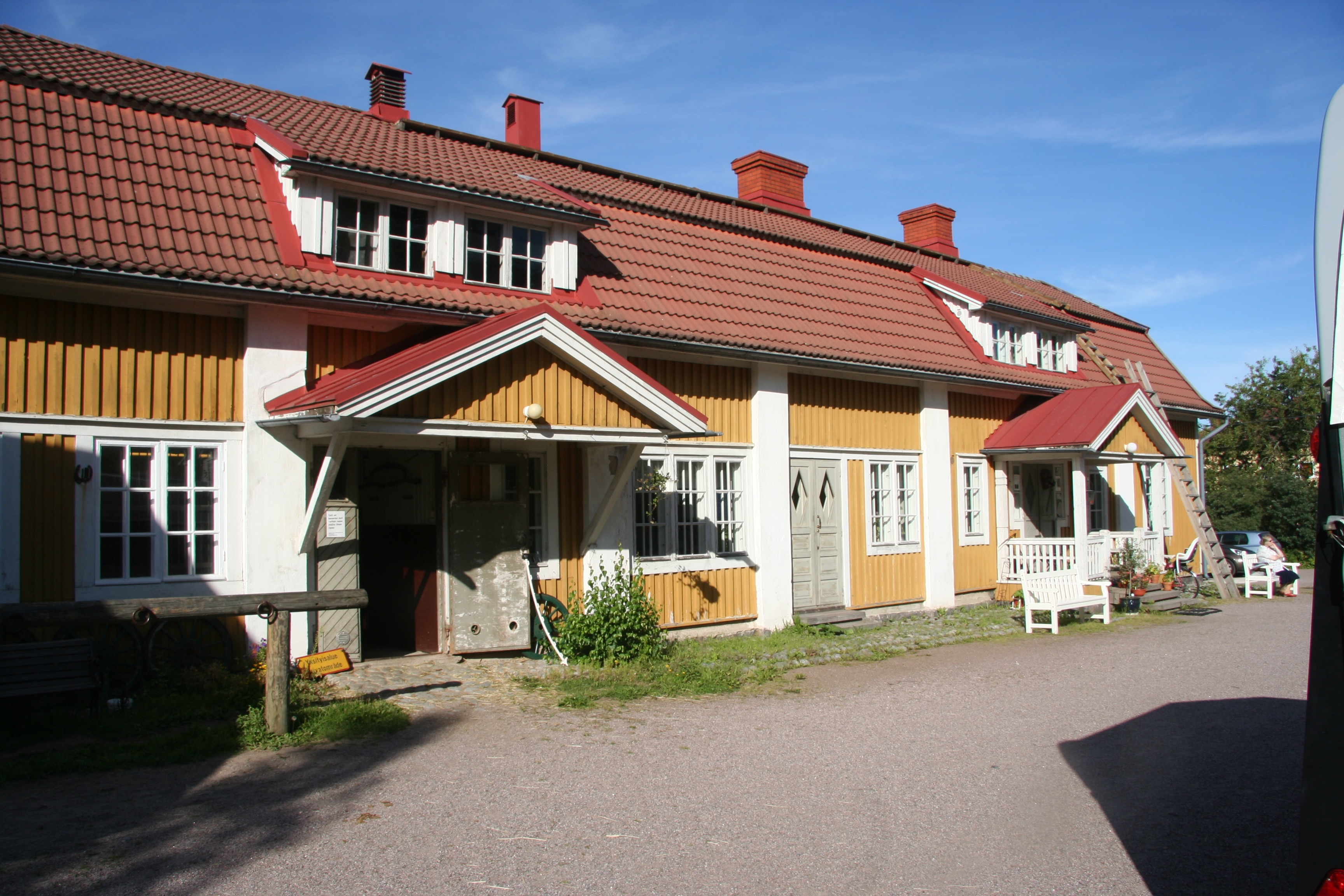 Annalan huvila, Helsinki